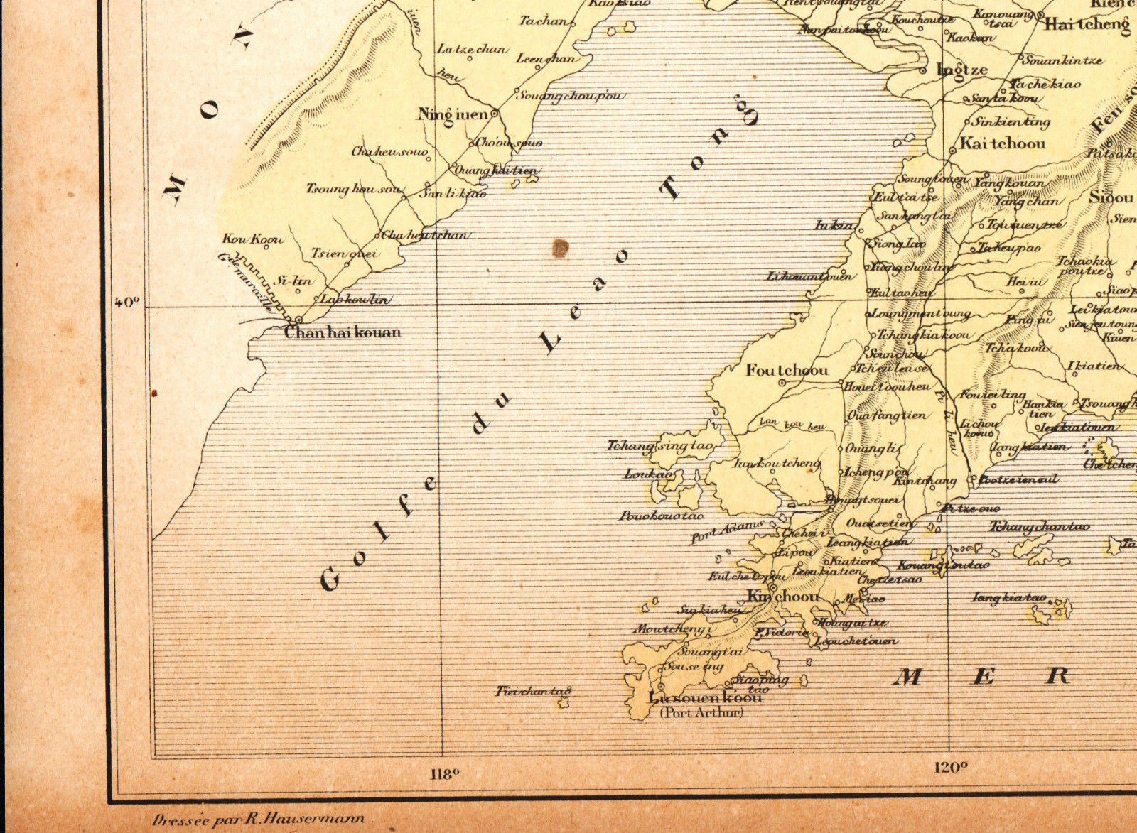 Sud de la Mandchourie méridionale avec Ing-Tze (Newchwang au nord) et Port-Arthur au sud. Avant 1904.